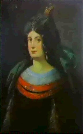 Turhan Sultan'in bir portresi.